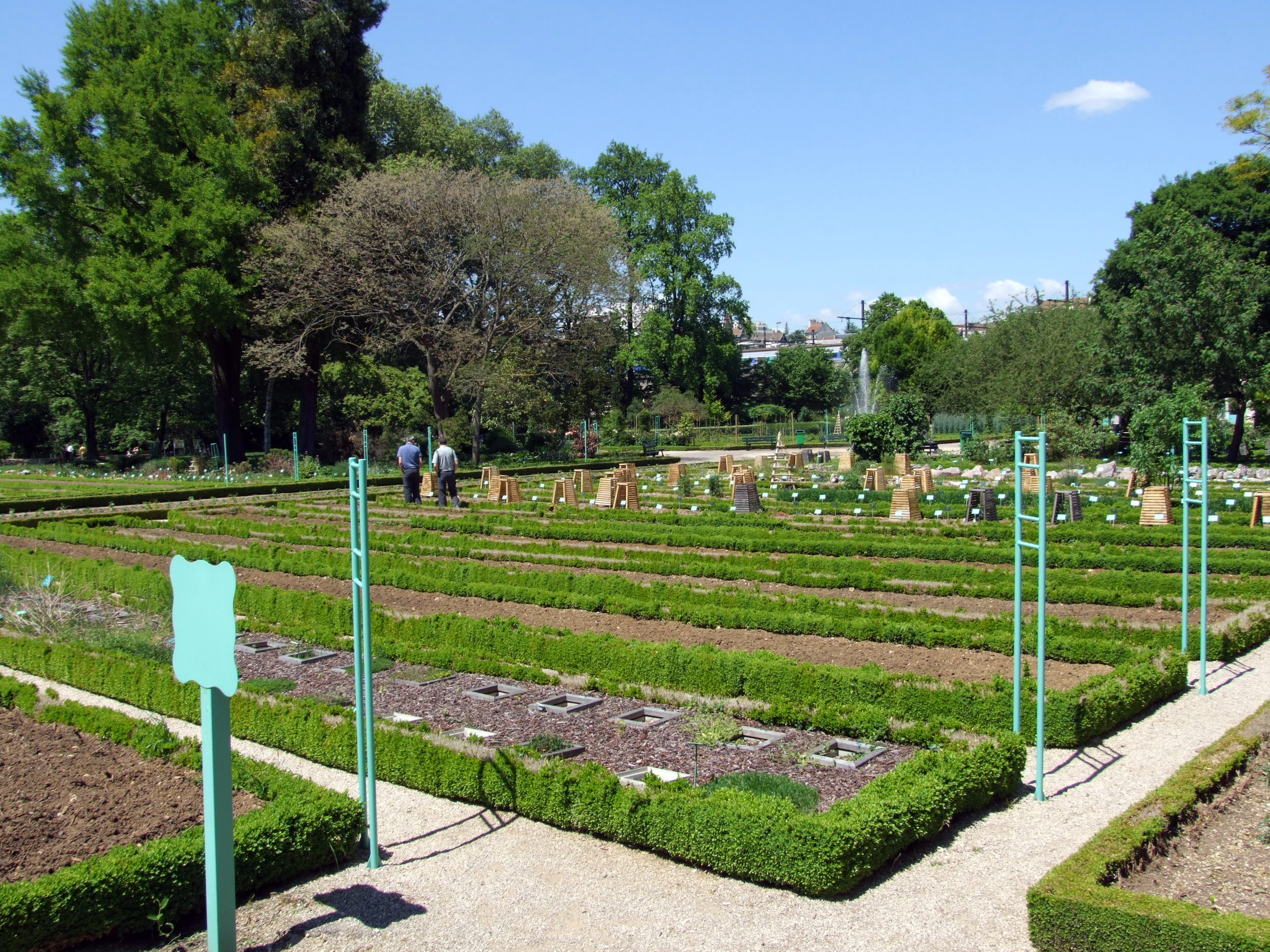 Jardin botanique de l'Arquebuse, Dijon, Bourgogne, FRANCE